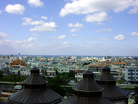 A skyline of Urasoe, Okinawa.